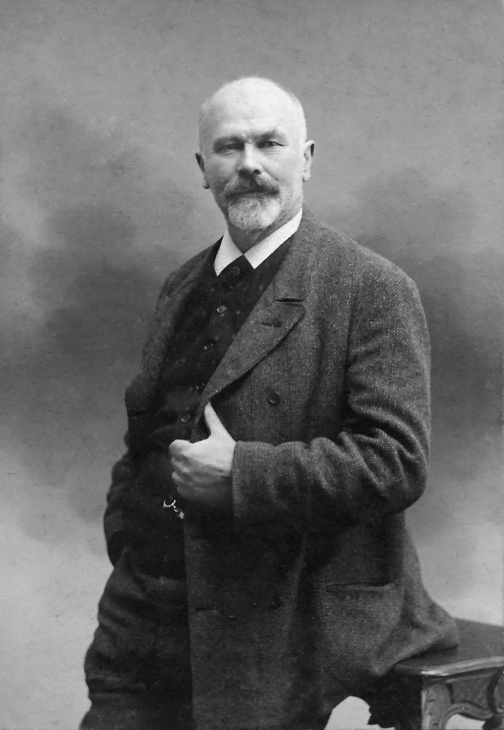 Michael Ancher portrætfoto